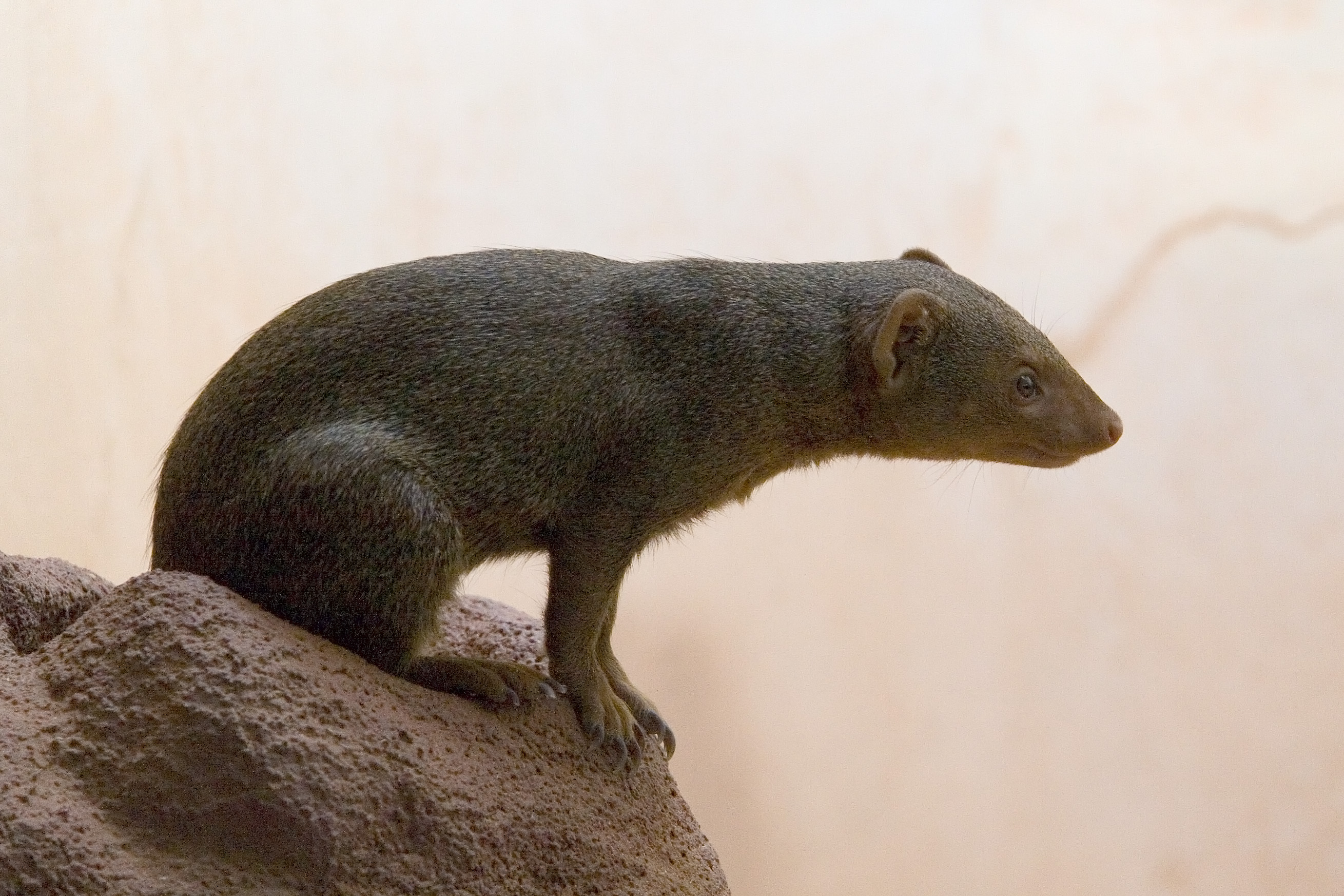 Zwergmanguste (Helogale parvula) im Frankfurter Zoo Dwarf Mongoose